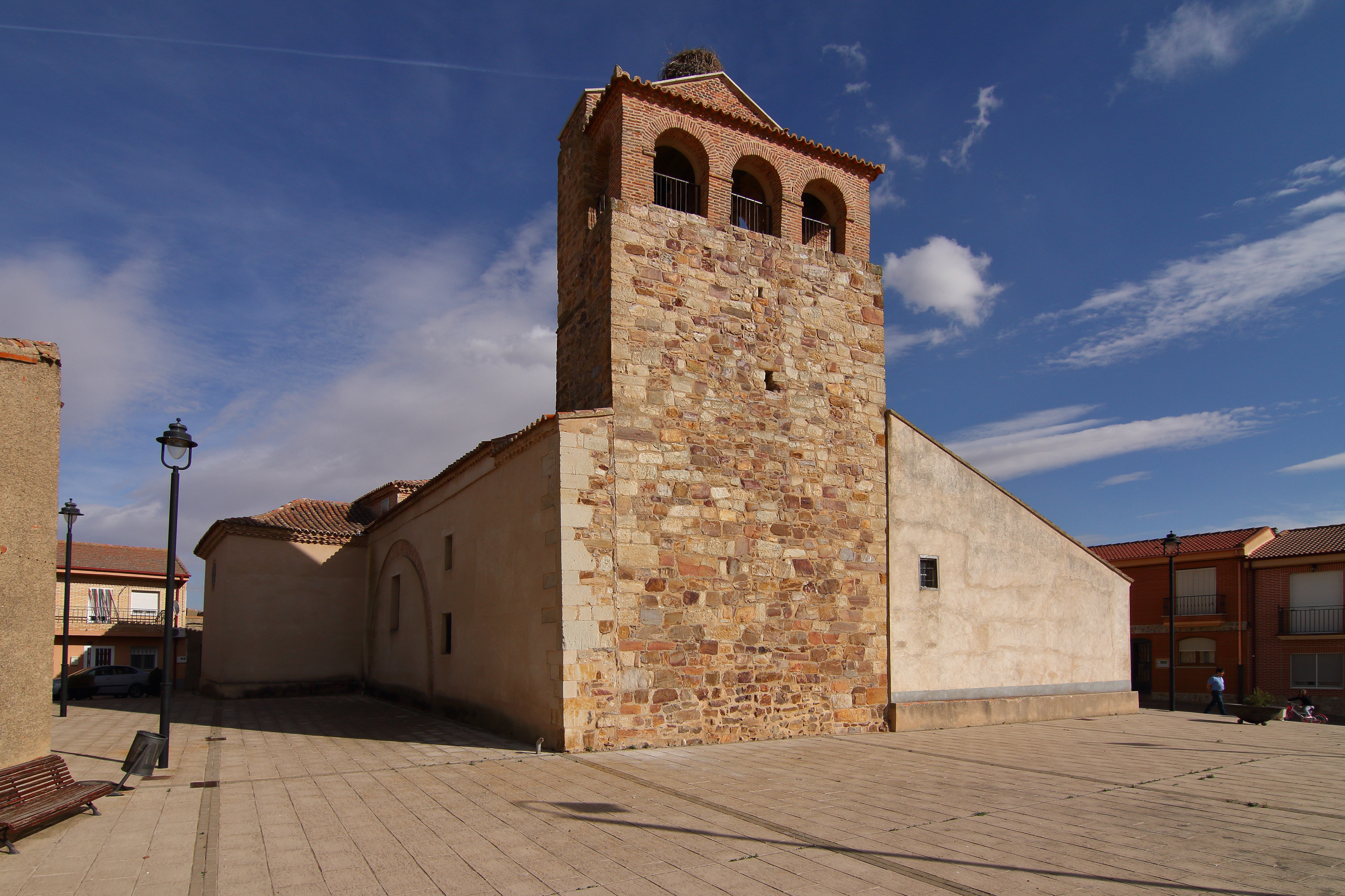 Pajares de la Lampreana, Iglesia de San Pedro, fachada oeste y norte